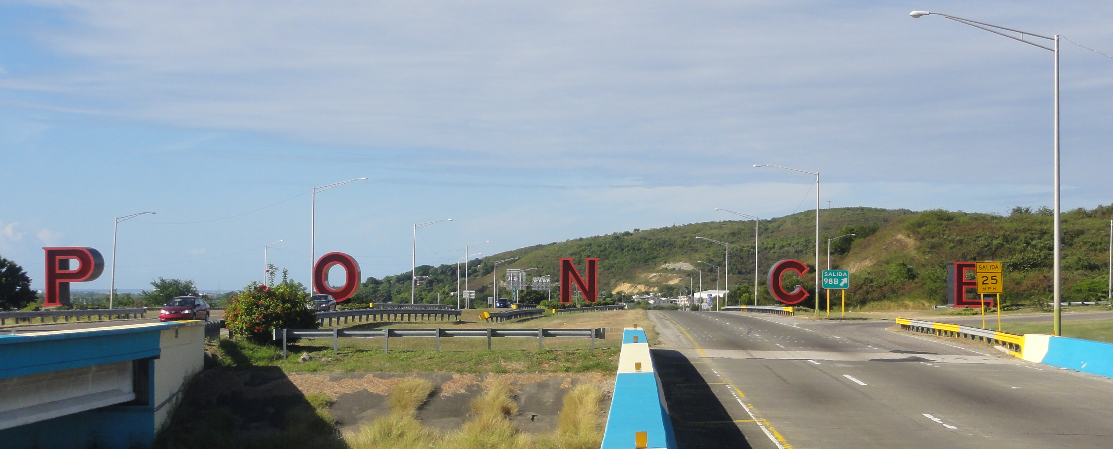 Letras de P-O-N-C-E in Barrio Sabanetas in Ponce, Puerto Rico